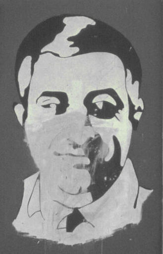 Otelo Saraiva de Carvalho, Portugal, Revolution, MFA